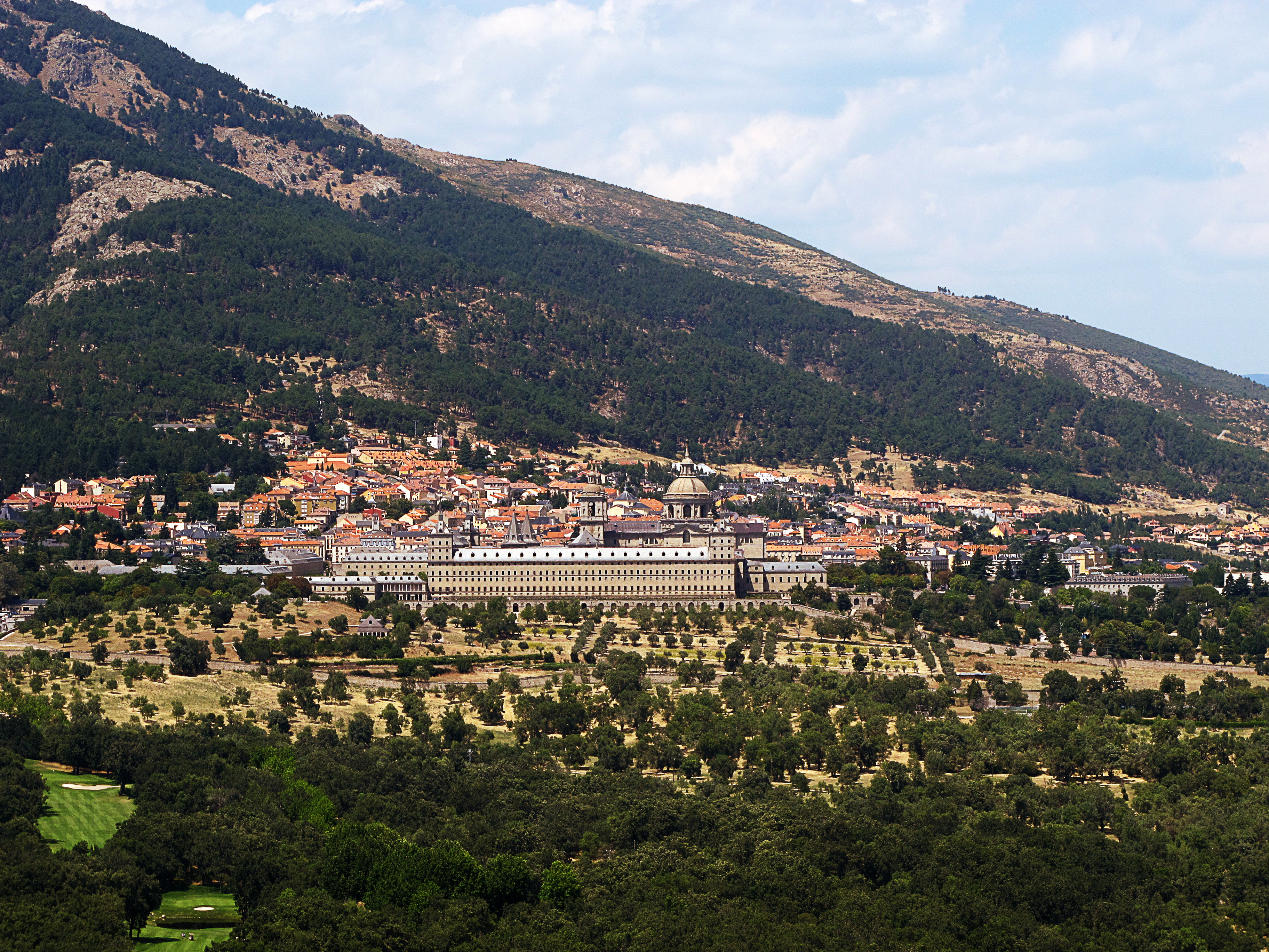 El Monasterio de El Escorial Como los templos cristianos, el monasterio está orientado siguiendo el eje Este-Oeste, aunque con una peculiaridad: está ligeramente desviado, de tal forma que su fachada Oeste se alinea a la perfección con la puesta de sol del día 10 de agosto, fecha de la victoria de San Quintín y festividad de San Lorenzo. Cumplió las funciones de monasterio, palacio, museo, biblioteca etc., fue erigido por el monarca para conmemorar la victoria de la batalla de San Quintín frente a las tropas francesas. Pero, al mismo tiempo –y según algunos autores– posee una segunda lectura de corte hermético. Una tradición muy arraigada en la época afirmaba que en El Escorial estaba la boca del infierno. Existen leyendas que atribuyen al Diablo un papel estelar en ese enclave y se ha llegado a decir que Felipe II pretendió tapar esa entrada al inframundo colocando encima el monasterio. Curiosamente, la basílica del templo alberga un cuadro de Sánchez Coello donde aparecen San Jerónimo y San Agustín y en el que éste último porta una maqueta del edificio mientras un niño señala un agujero en el suelo. ¿La boca del infierno? Dado el carácter esotérico que está presente en el edificio ¿está realmente el Monasterio sellando la entrada del infierno o por el contrario sería una puerta de acceso al inframundo…?